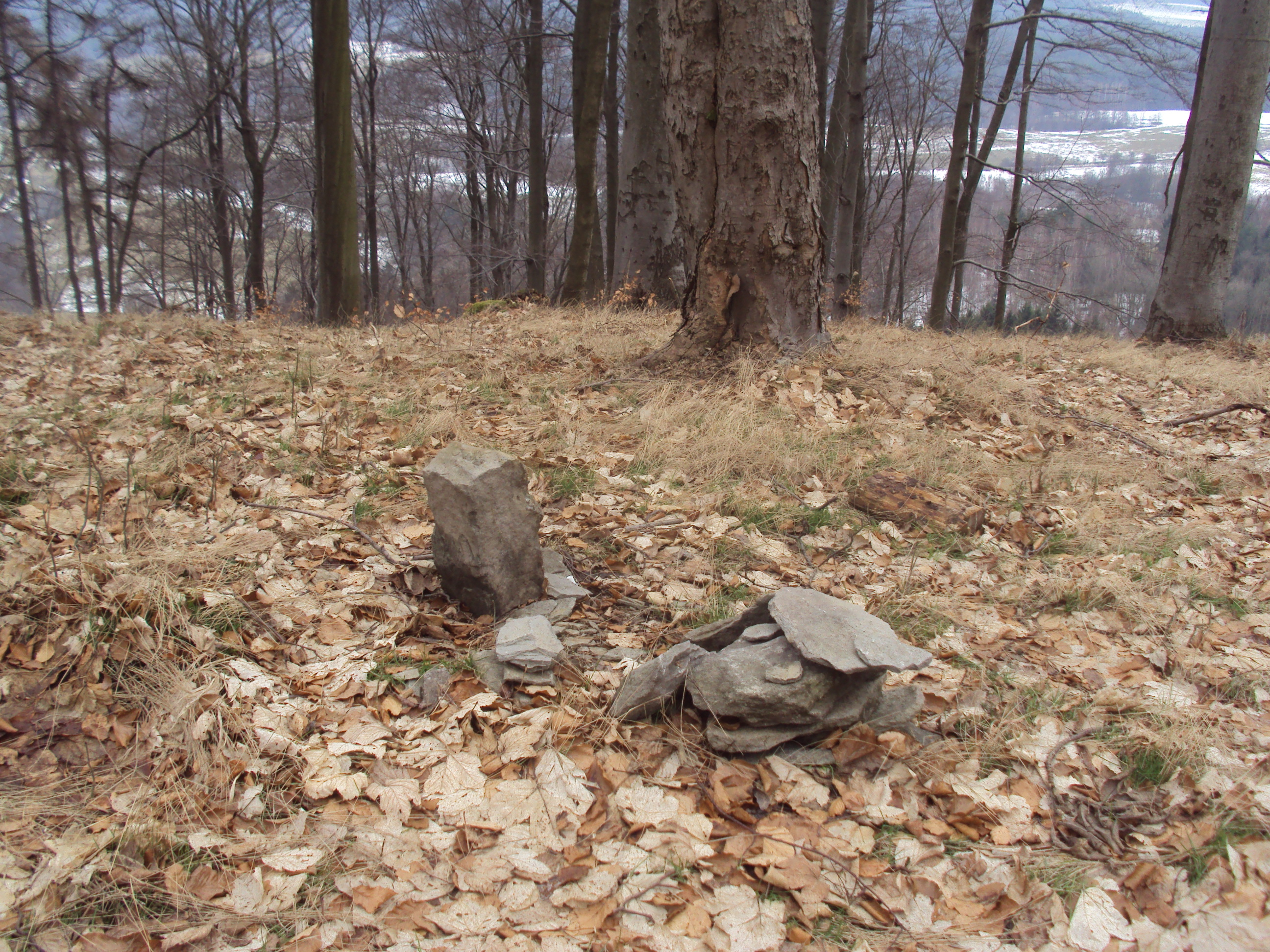 Vrchol kopce